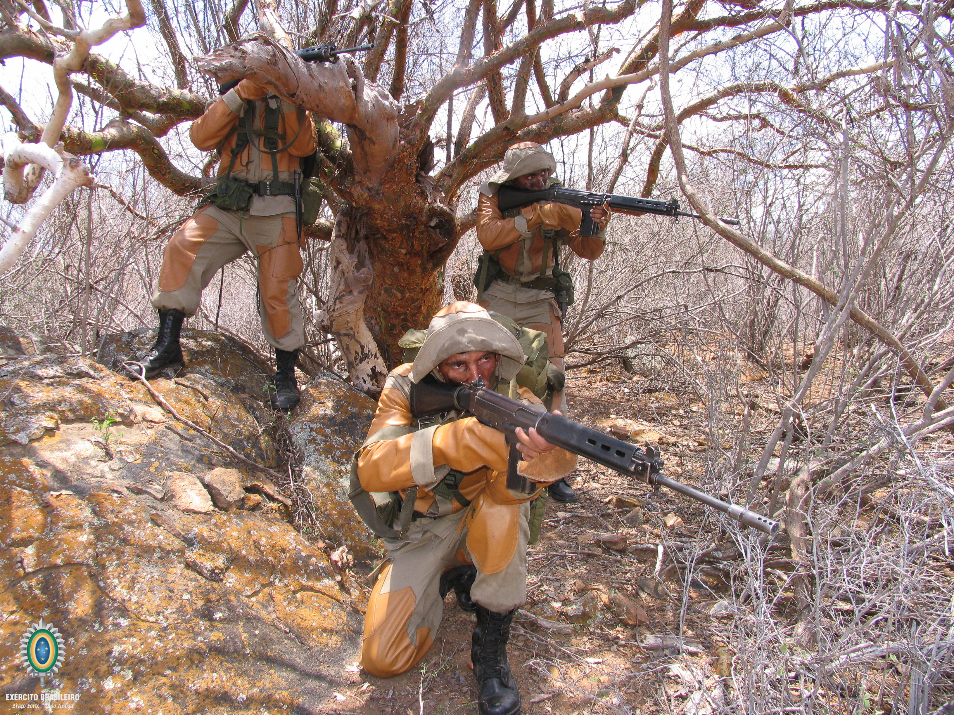 Combatente da Caatinga. Foto: Ivan Cruz